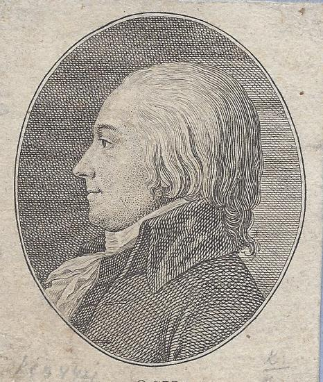 Peter Ochs (1752-1821), Kupferstichvignette aus dem Revolutions-Almanach von 1799, Göttingen, bei: Johann Christian Dieterich.